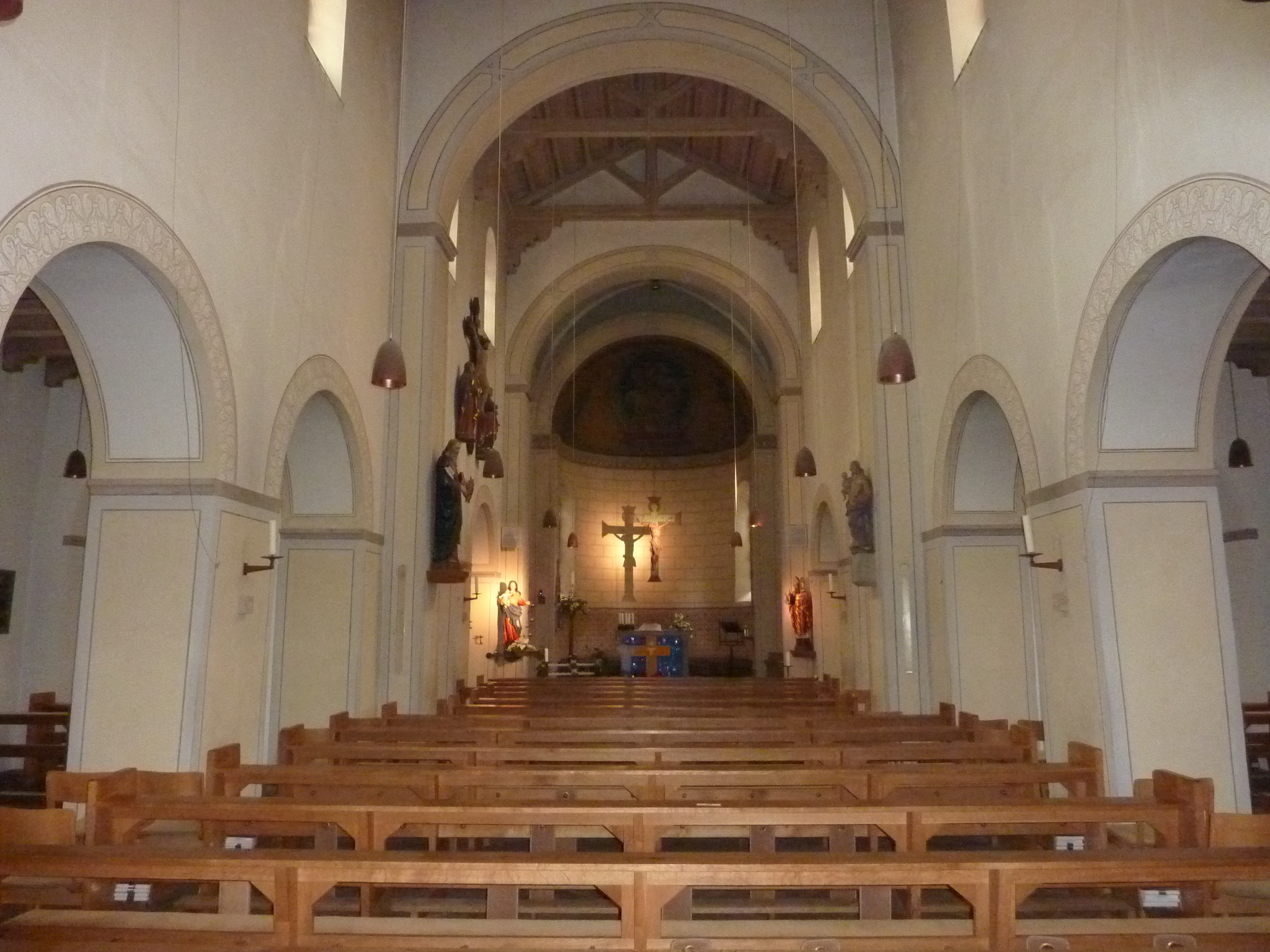 St. Severin (Köln-Lövenich)